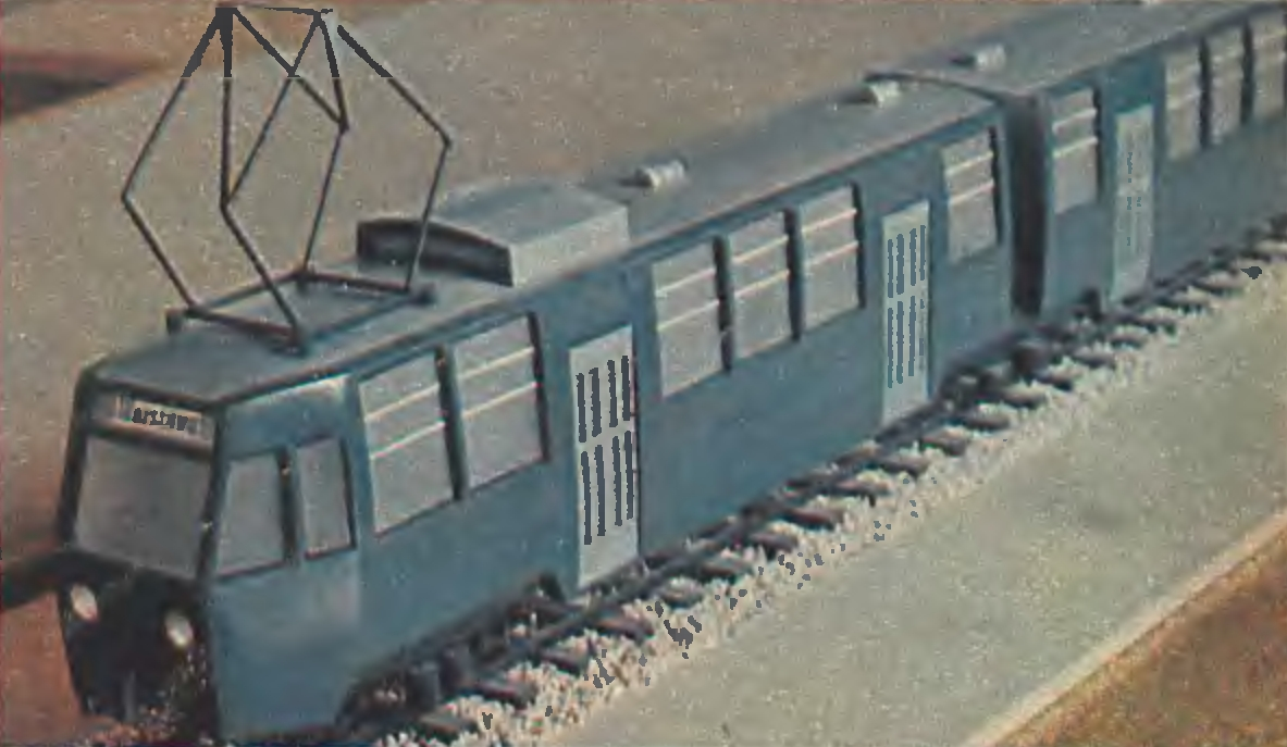 Projekt nowego wagonu dla kolejki WKD, opracowany przez zespół projektantów IWP w składzie: Ryszard Dworak, Andrzej Kasten, Józef Kandefer, Mieczysław Naruszewicz, Stanisław Peliwo i Karol Turski.